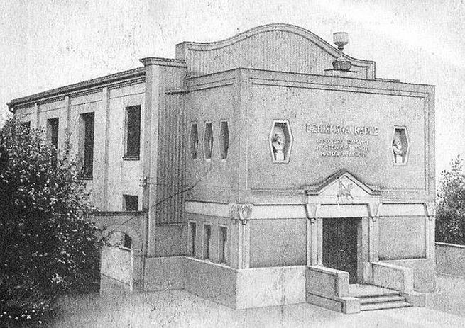 Betlémská kaple na Žižkově, původní stav před dostavbou zvonice.